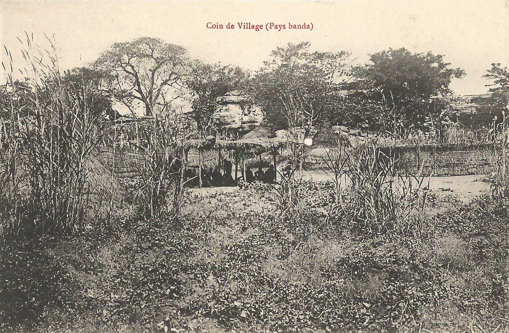 Coin de village (Pays banda). Carte postale ancienne, sans indication d'auteur, d'éditeur ou de date. Collection particulière